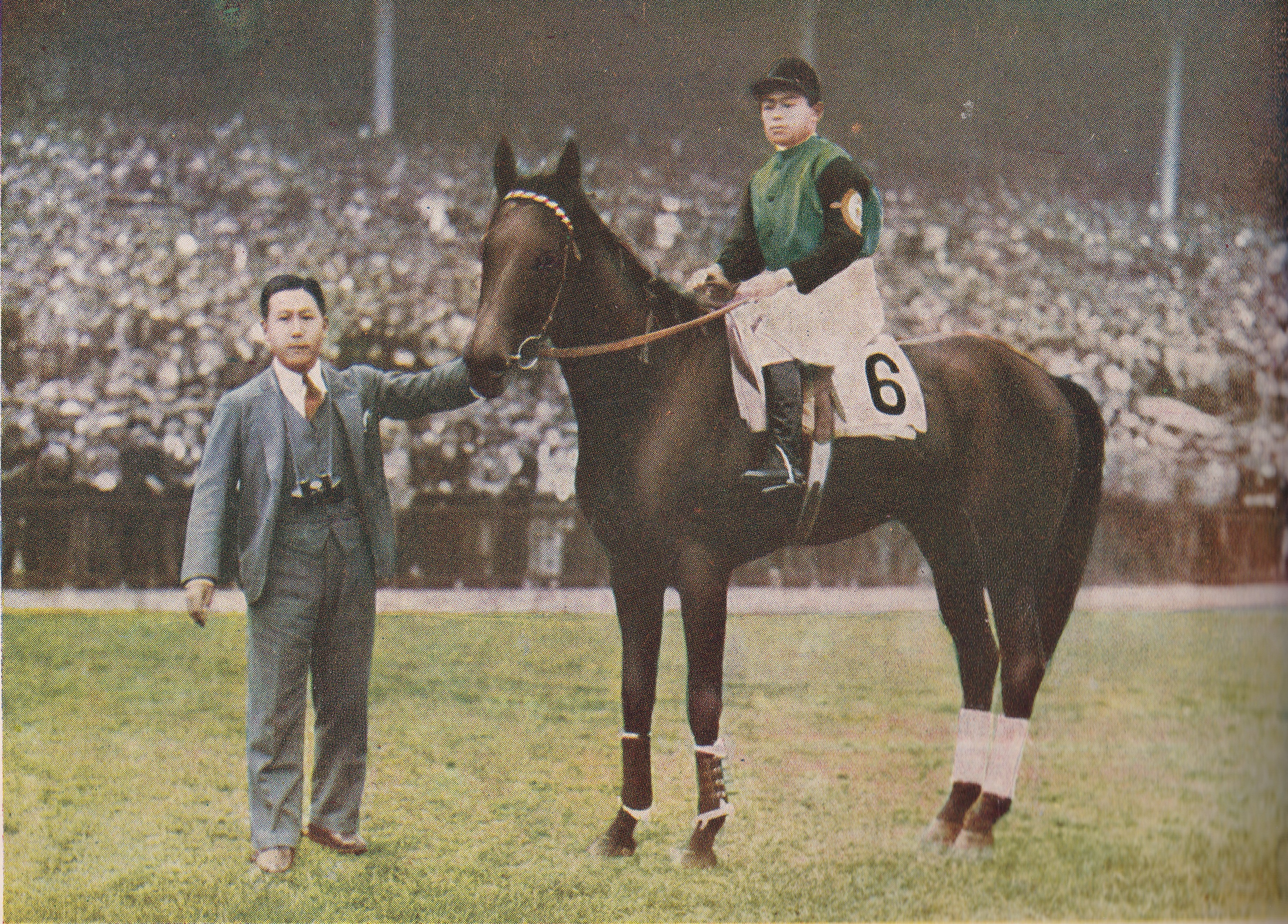 1936年のジュピターユートピア